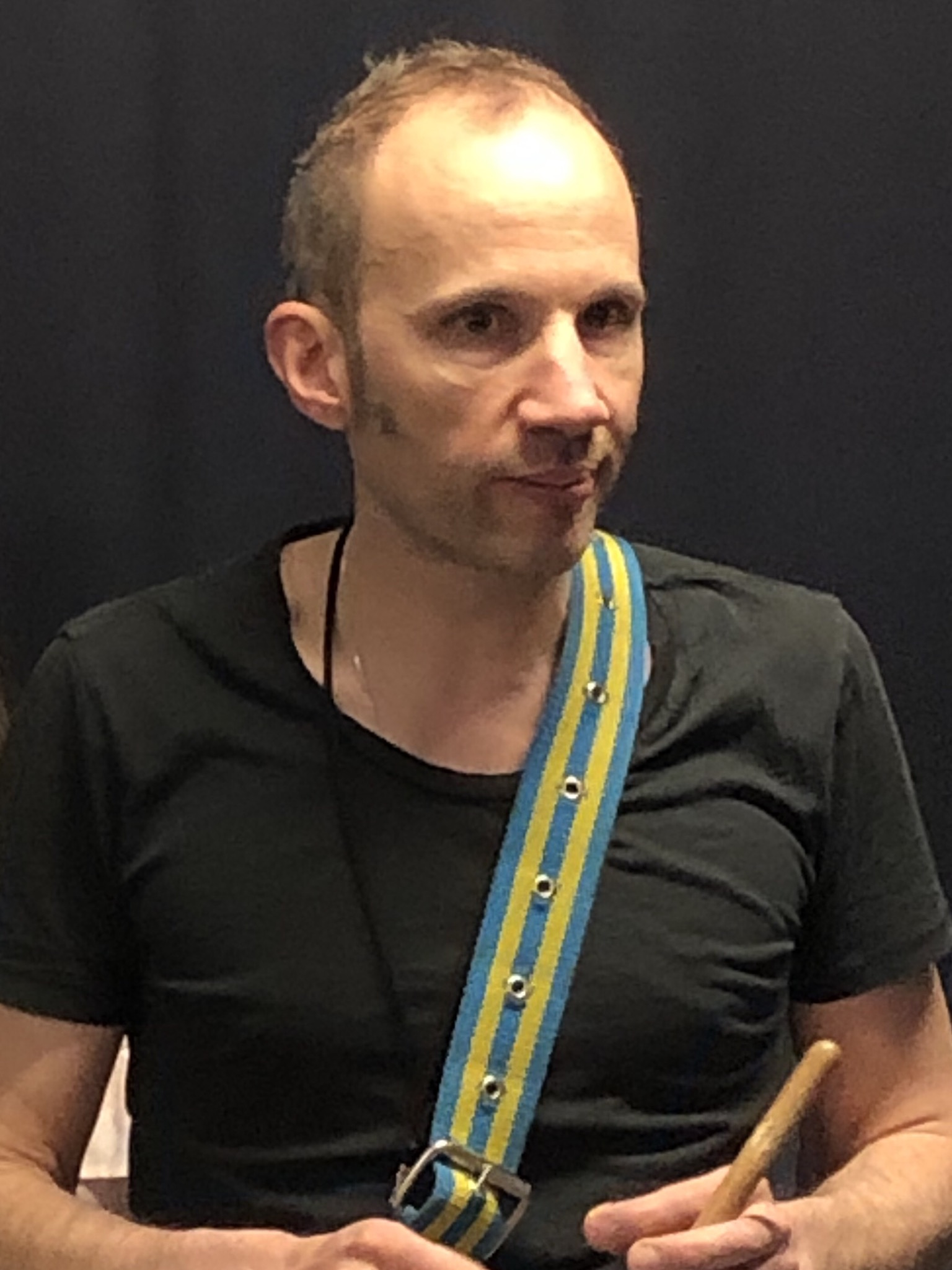 Finn Björnulfsson under en sambaworkshop 2019